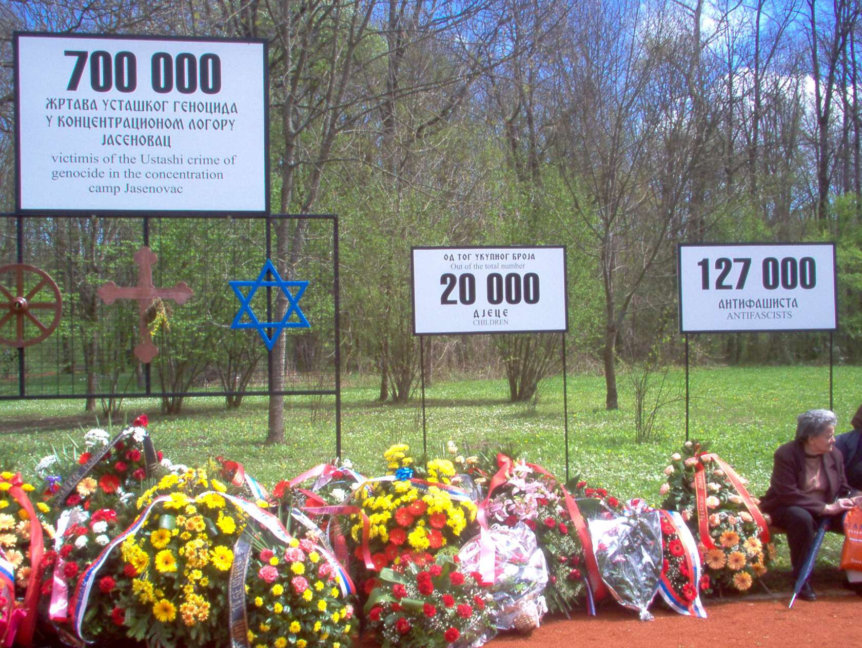 Jasenovac.